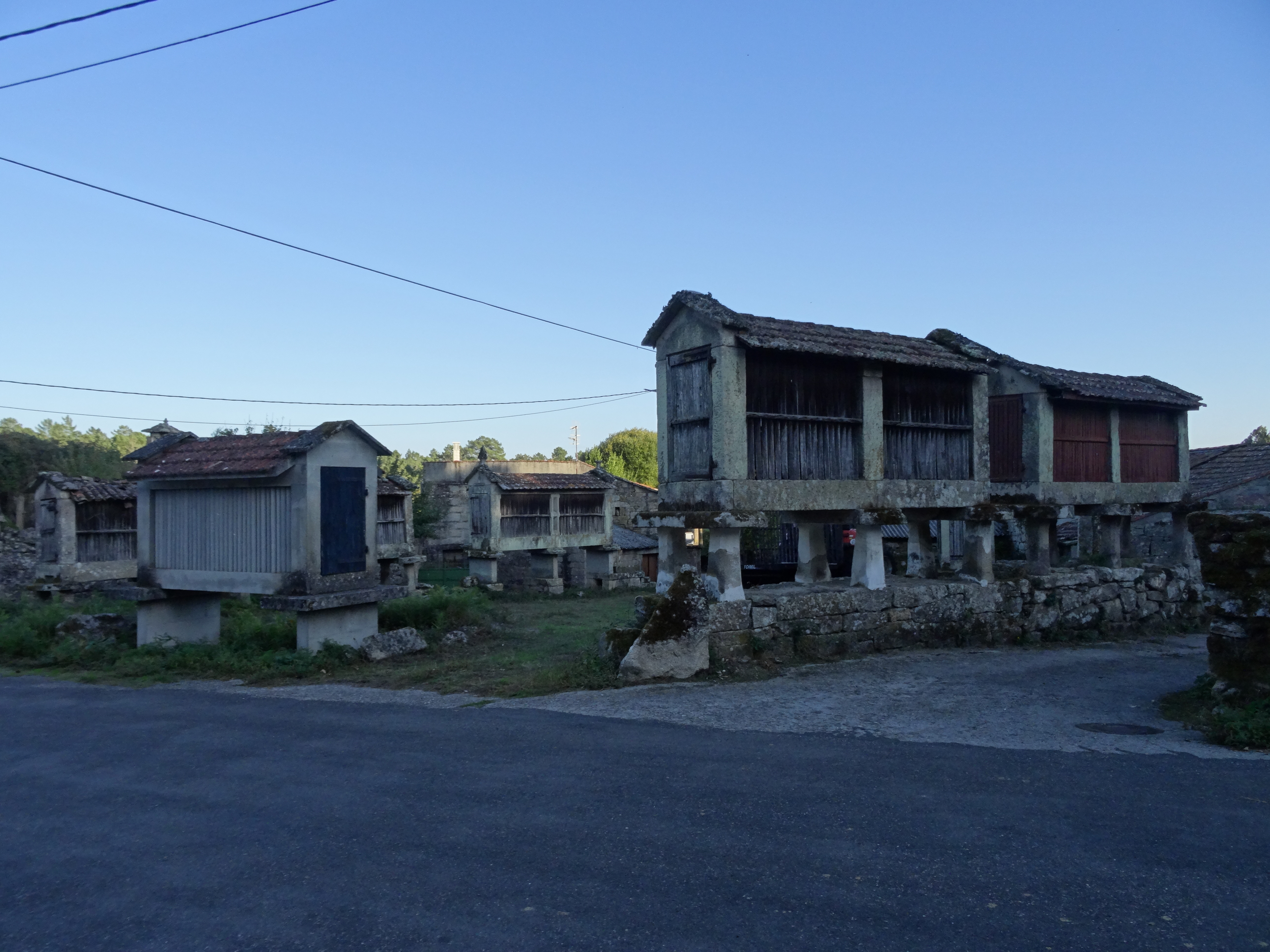 Ver título.